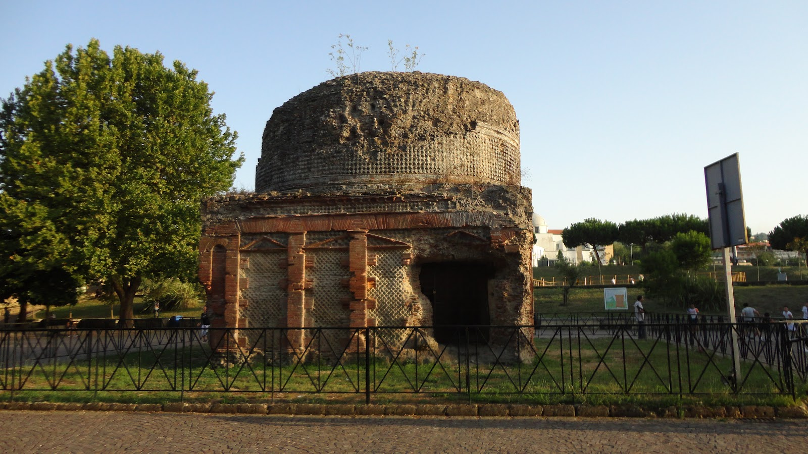 Monumento funebre più importante della Campania